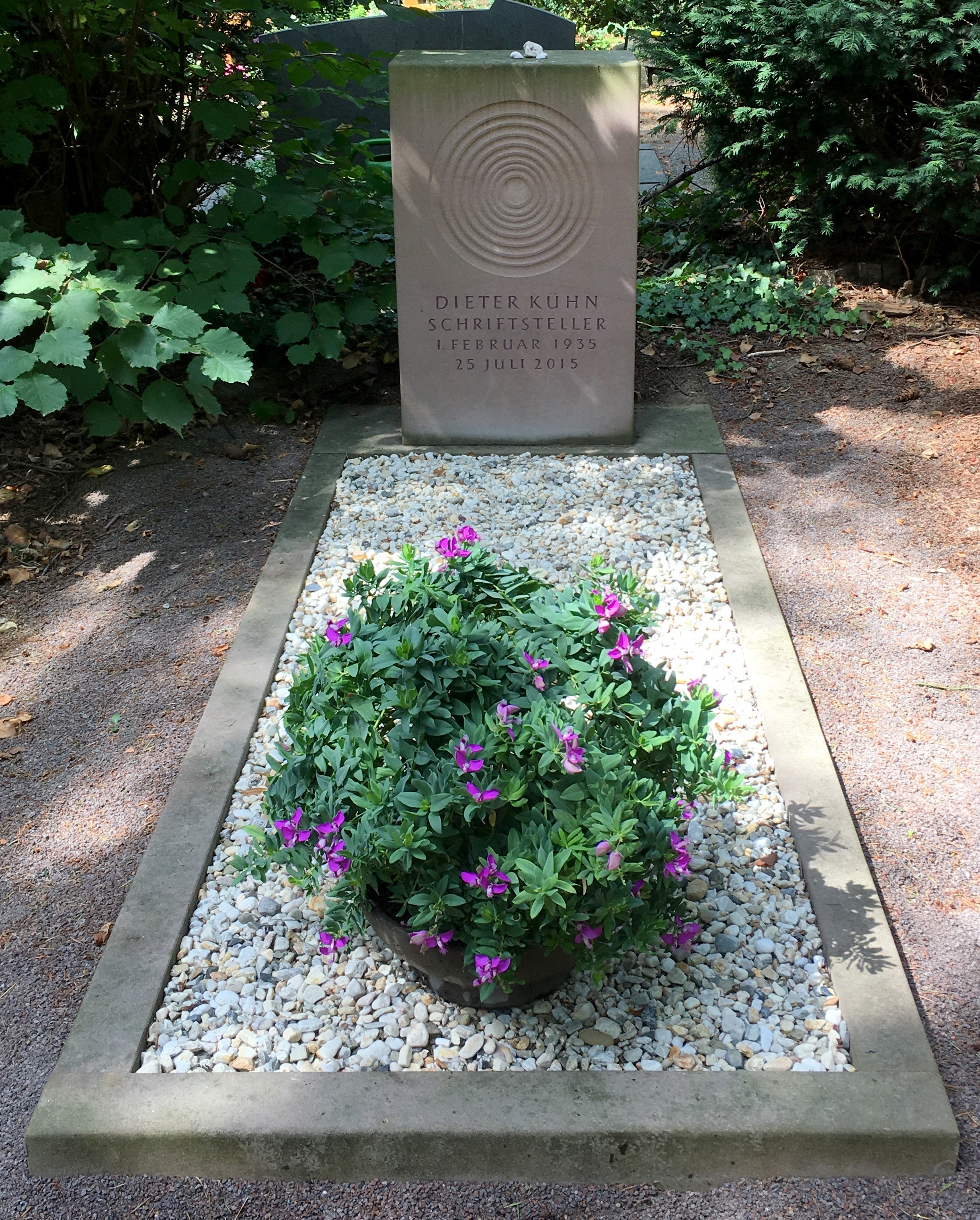 Das Grab seit August 2019